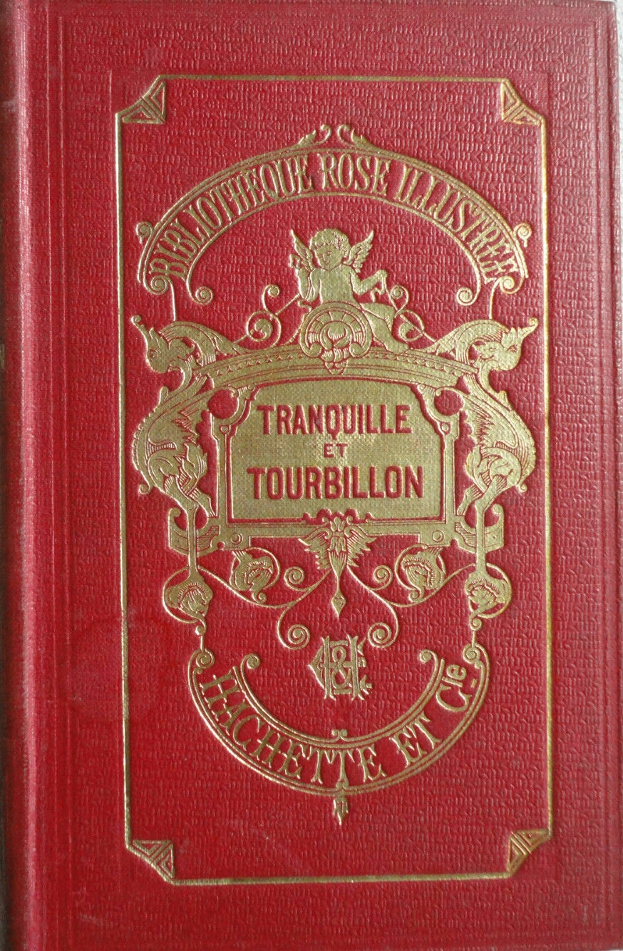 Zénaïde Fleuriot, Tranquille et Tourbillon (1880), édition Hachette, collection Bibliothèque rose, 1912.